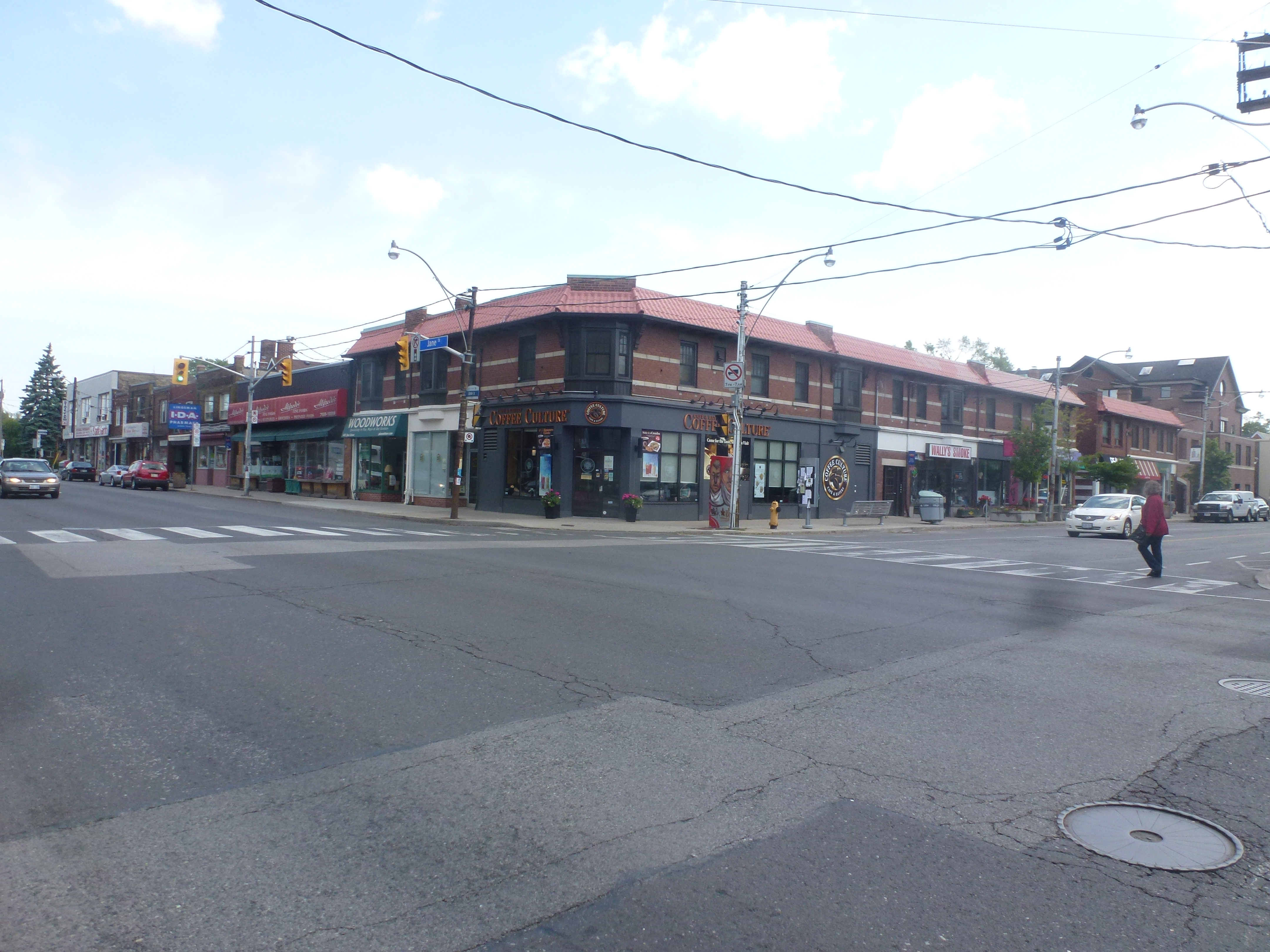 Jane and Annette, 2014 06 09 -a